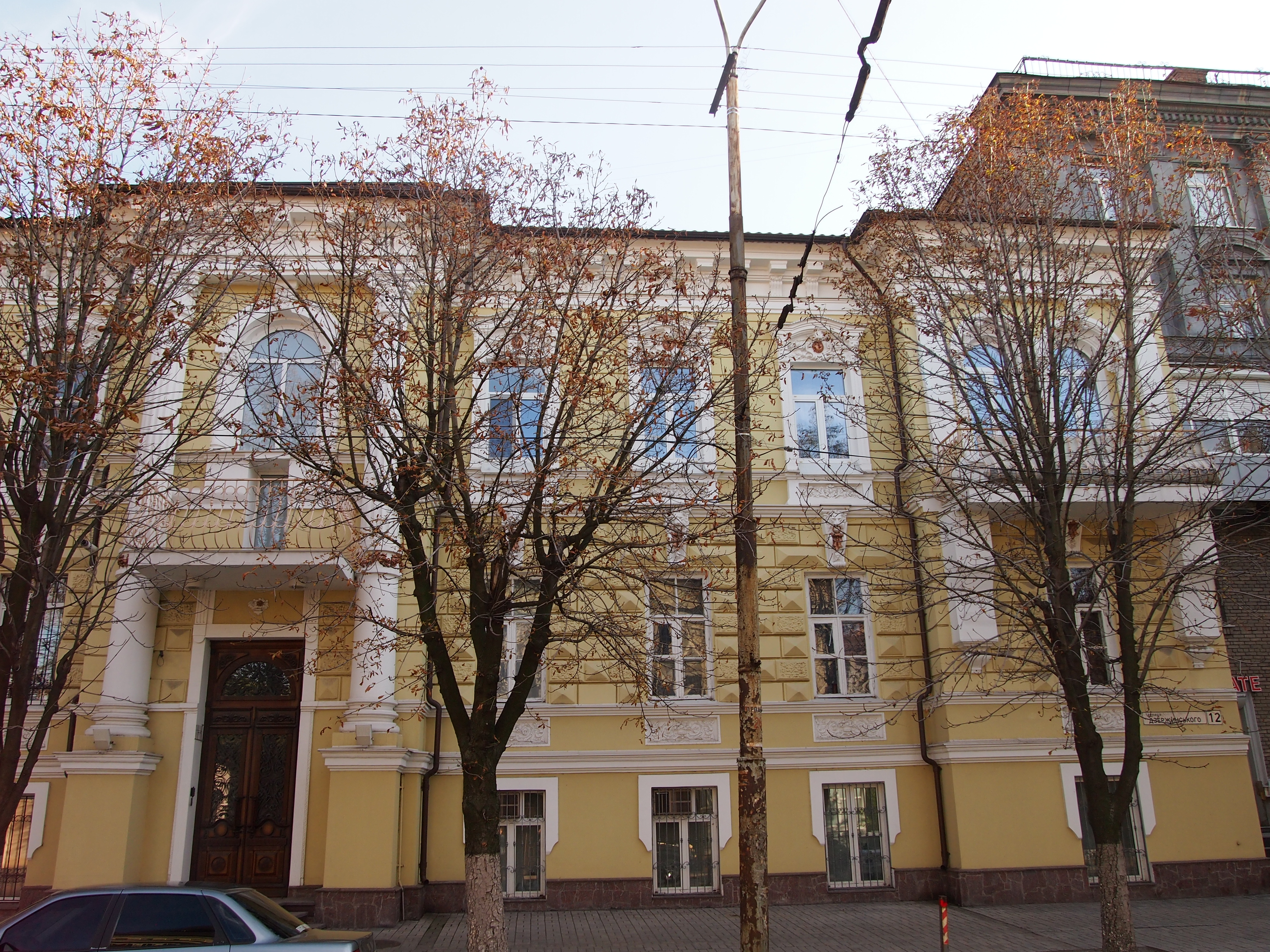 Доходний будинок, Дніпропетровськ, Дзержинського вул., 12